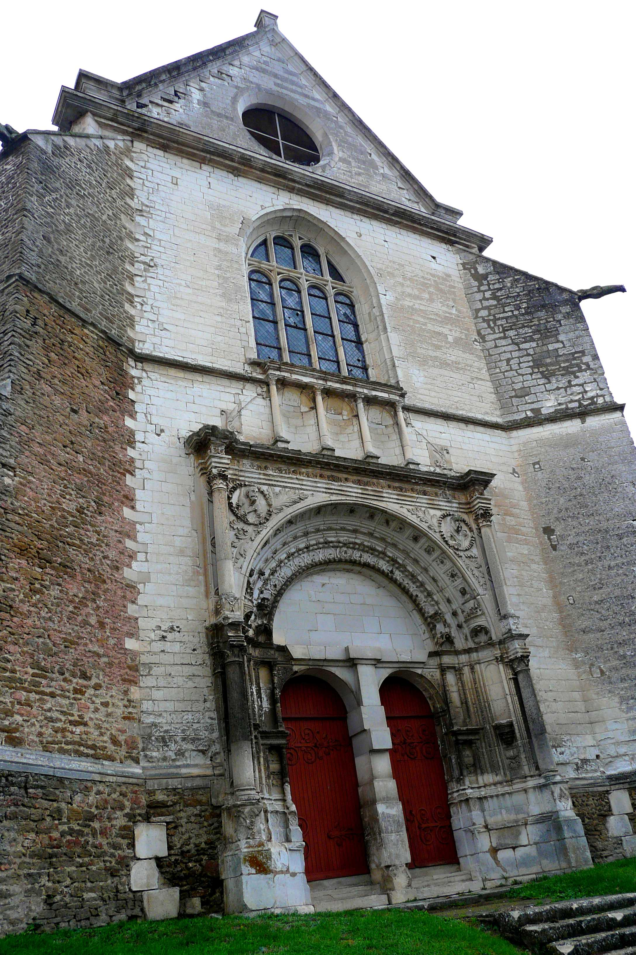 portail renaissance de l'église de Neuvy Sautour